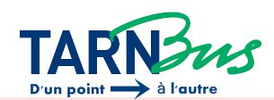 Logo de TarnBus.